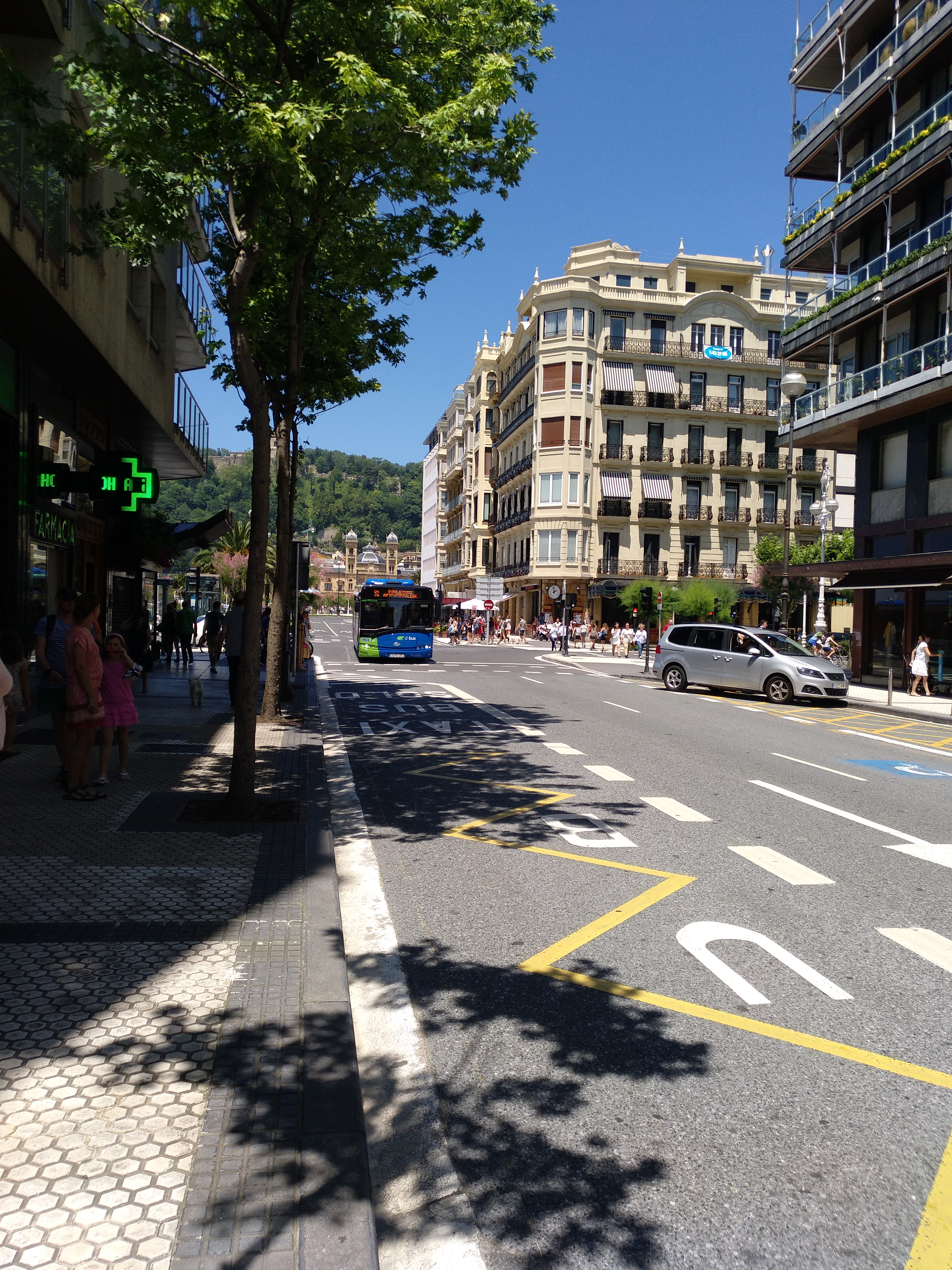 Autobús urbano de San Sebastián (d•bus) entrando en la calle Urbieta